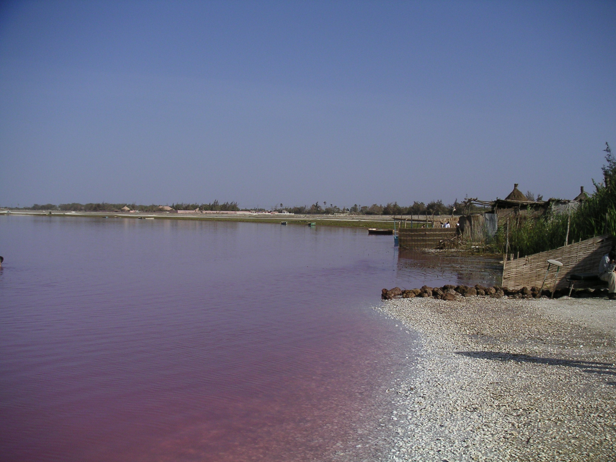 Site privilégié pour l'arrivée du Paris/Dakar, le lac rose possède 390g de sel par litre d'eau